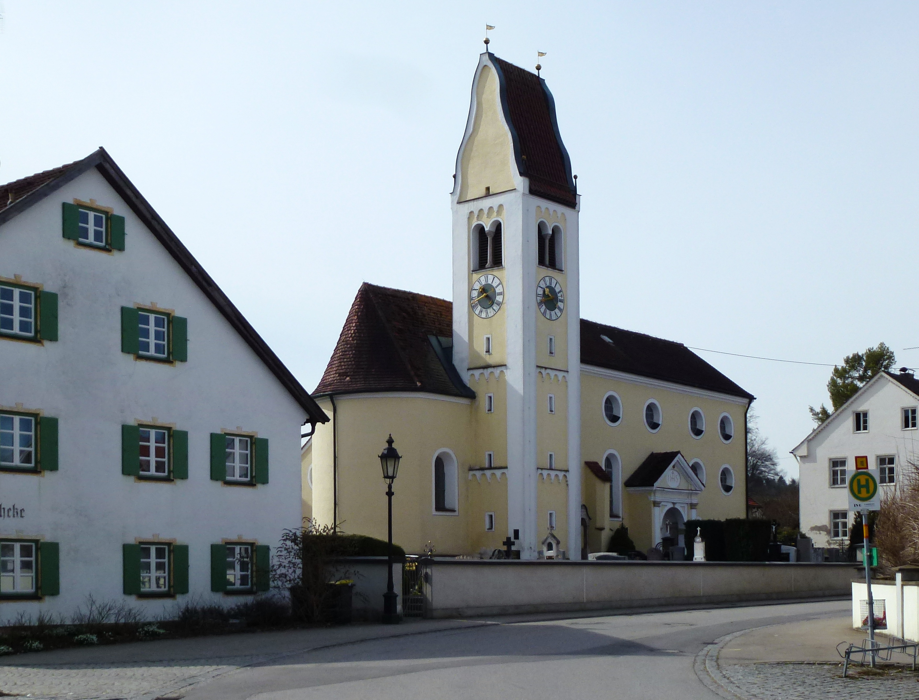 Windach_Von-Pfetten-Füll-Platz 3, Katholische Nebenkirche Kirche St Petrus und Paulus, Ansicht von NO